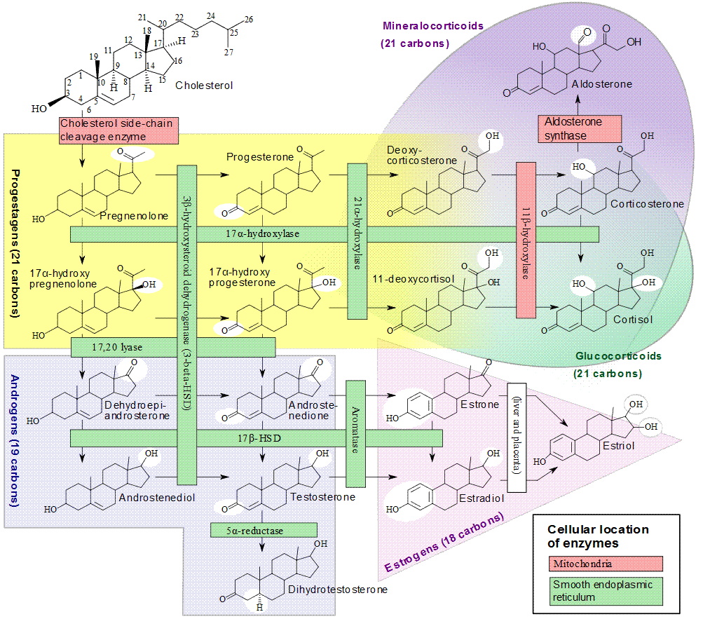 Steroidogenesis